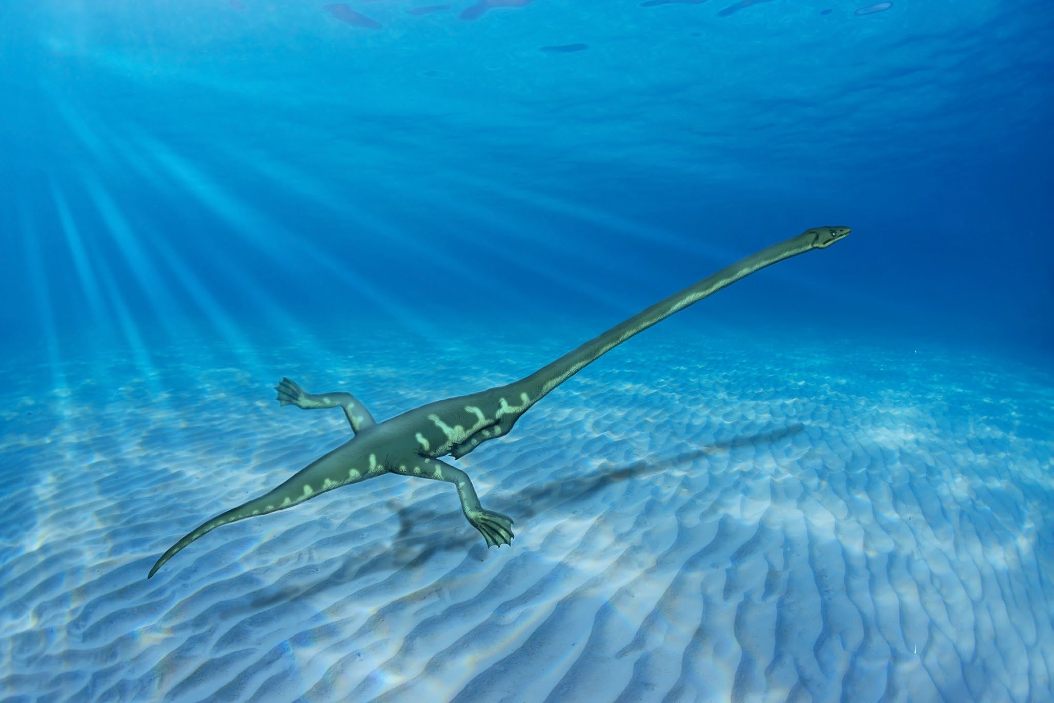 Reconstruction of Tanystropheus swimming in shallow sea.